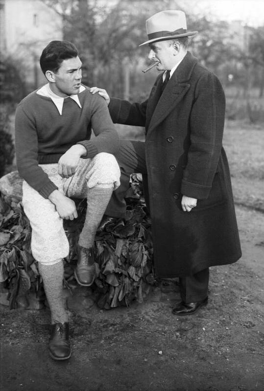 Max Schmeling Boxweltmeister! Boxweltmeister Max Schmeling mit seinem Manager, dem Amerikaner Joe Jacobs